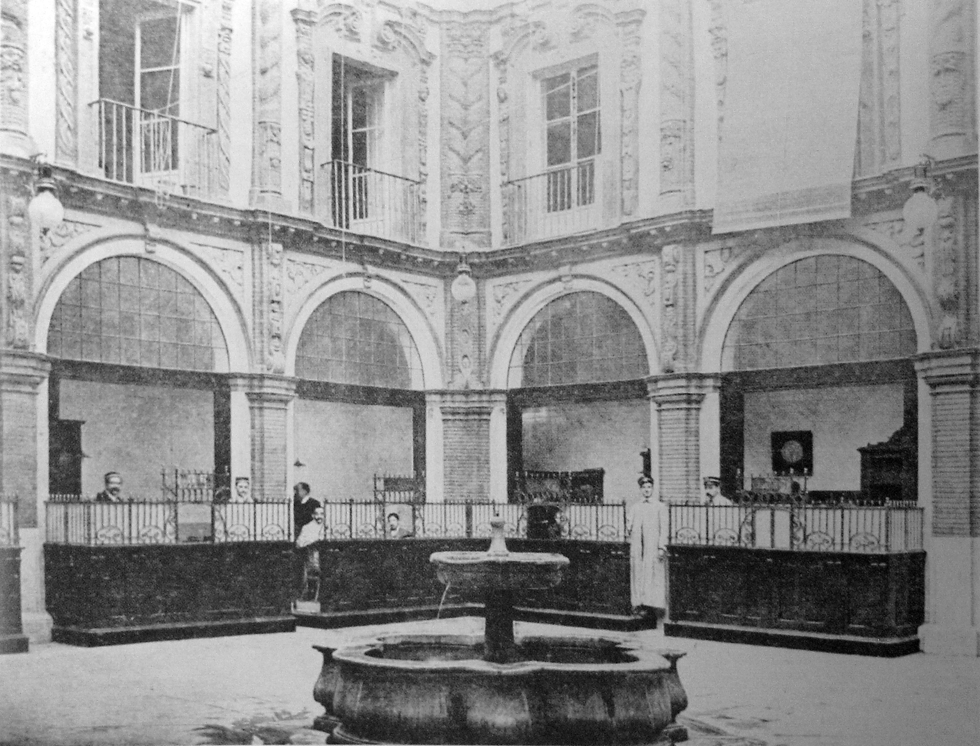 Oficina de Correos de Sevilla, en el antiguo convento de San Acacio.